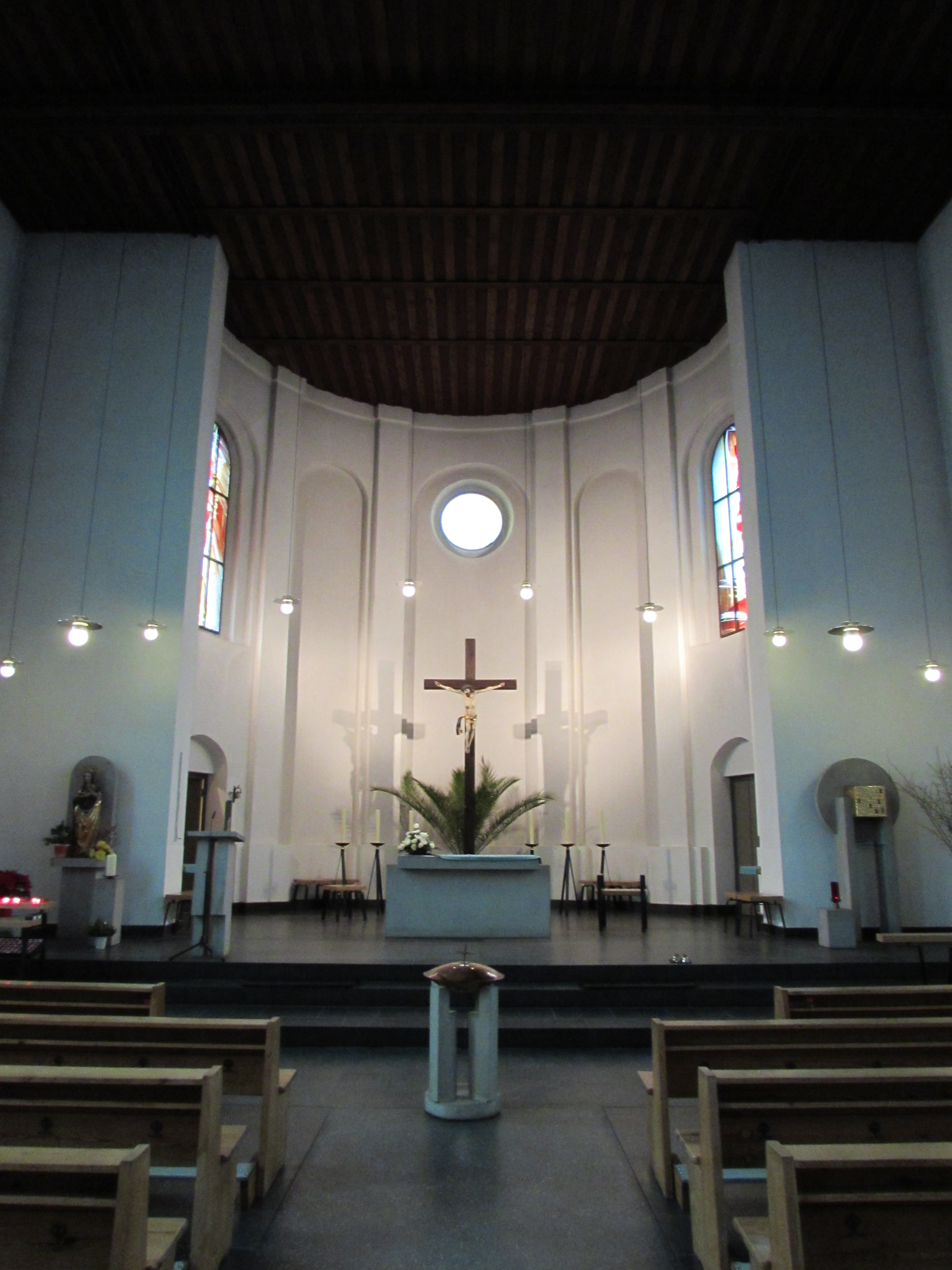 blick in den altarraum, heilige dreifaltigkeit brandenburg